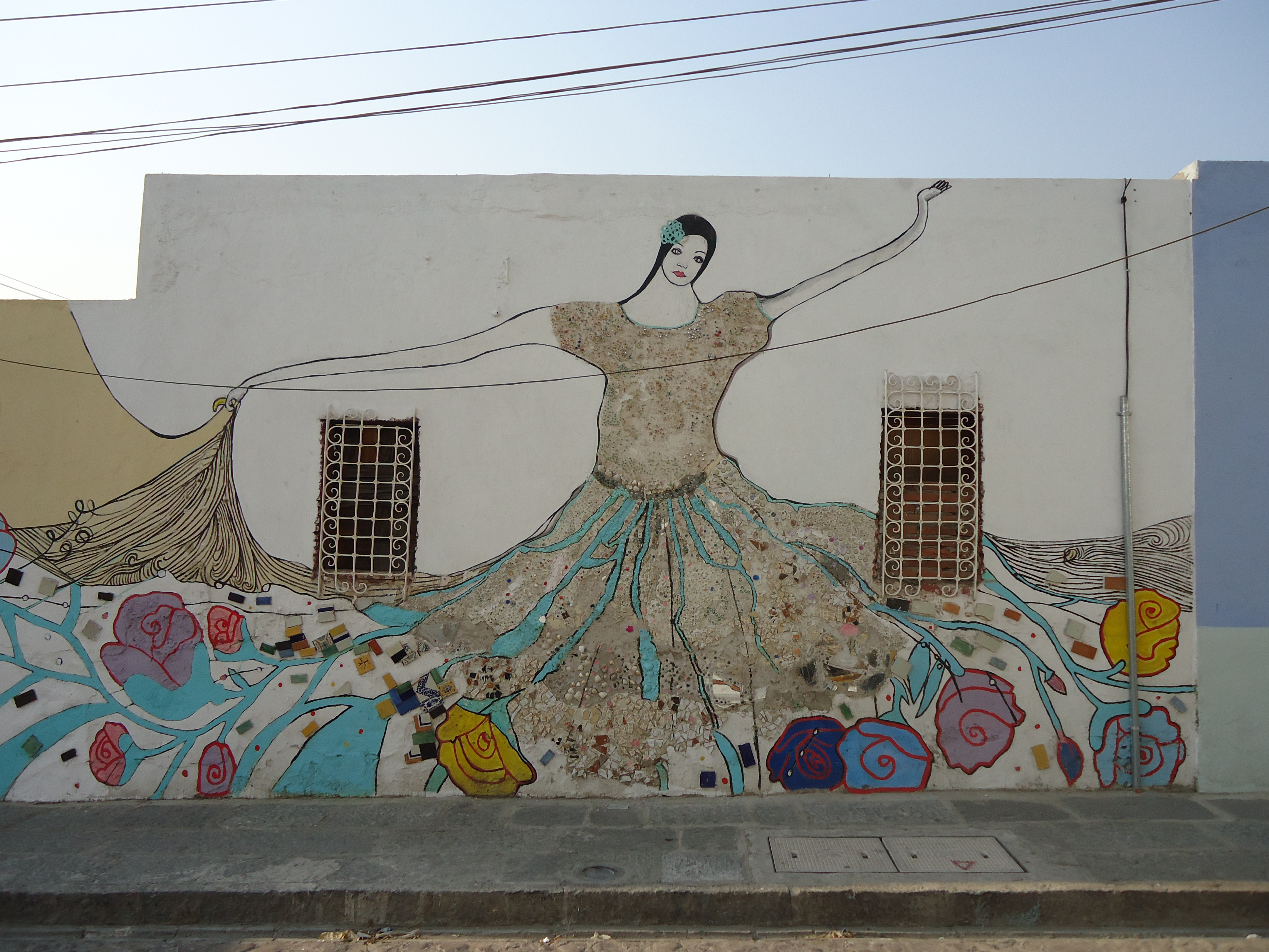 Pieza del proyecto "Puebla Ciudad Mural" impulsado por el Colectivo Tomate en el Barrio de Xanenetla, en el Centro de Puebla, Mexico.